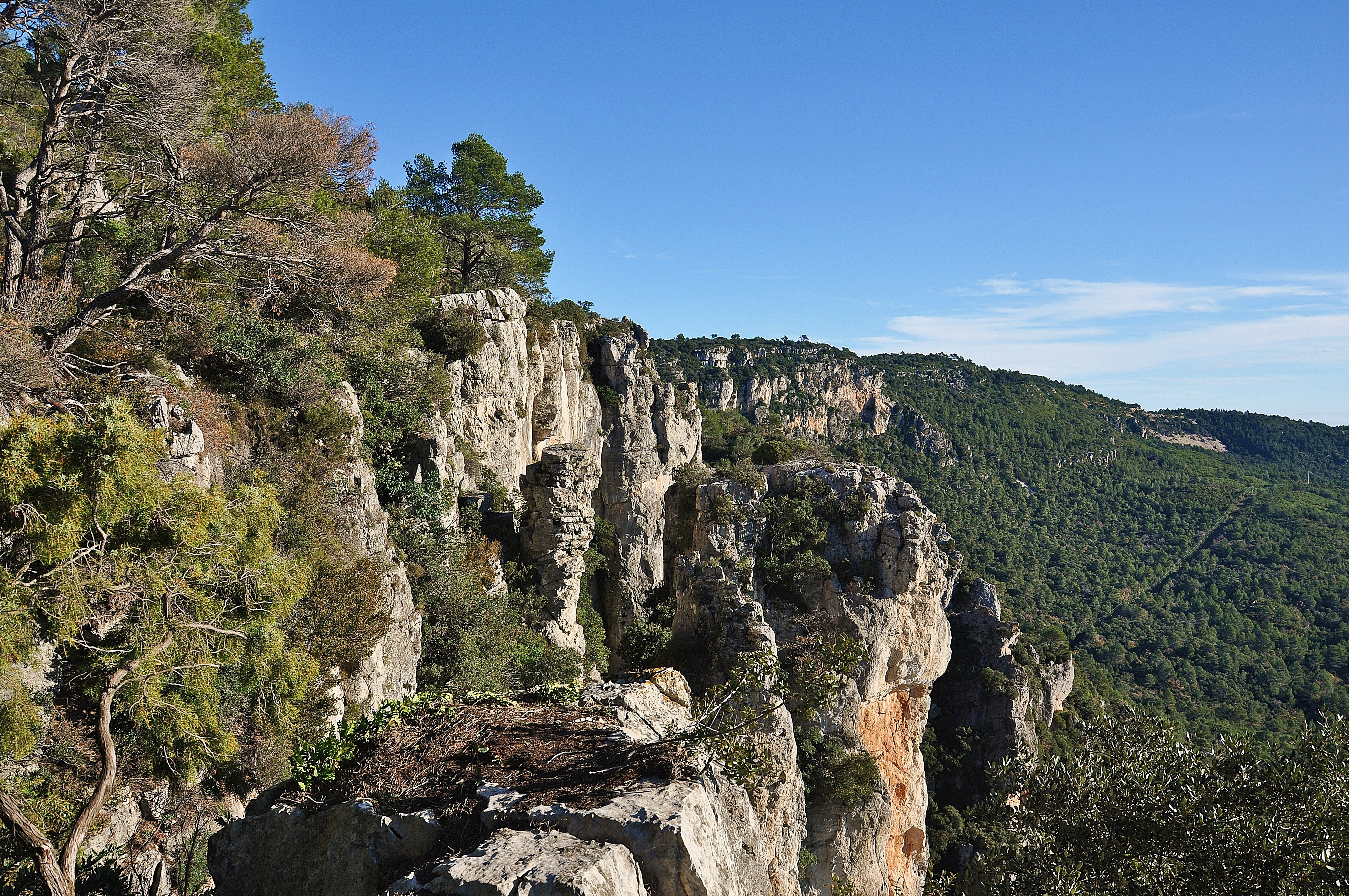 montañas de mont-ral en alt camp-tarragona-cataluña